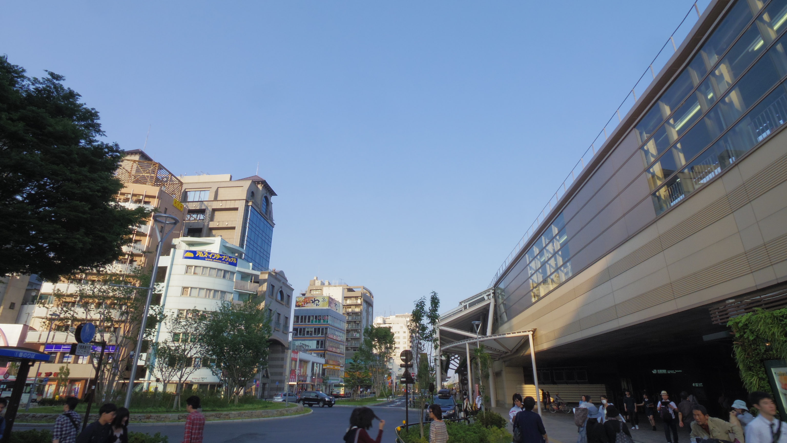 JR武蔵境駅北口駅前広場（2016年5月22日撮影）